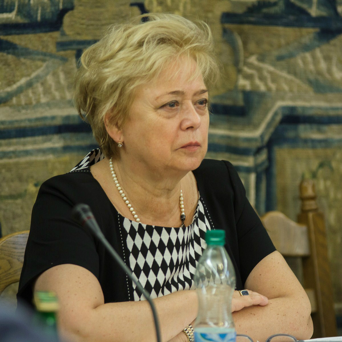 Prof. Małgorzata Gersdorf, prawniczka.